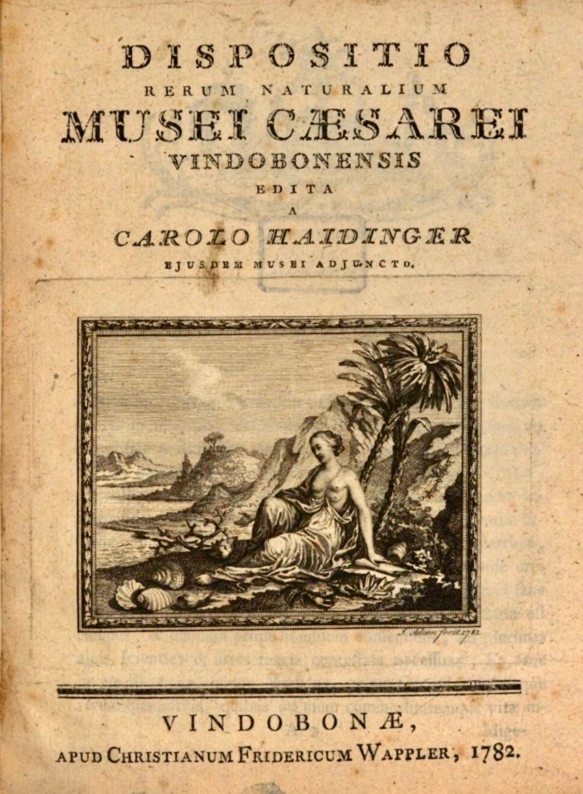 Titelseite von: Dispositio rerum naturalium Musei Cæsarii Vindobonensis edita a Carolo Haidinger ejusdem musei adjuncto. Christianus Fridericus Wappler, Vindobonae 1782. (Vignette von Jakob Adam.)